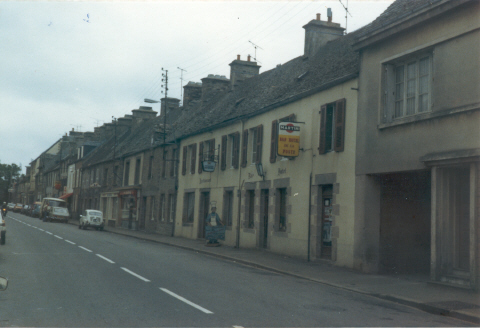 Beaumont-Hague, la rue principale en 1978